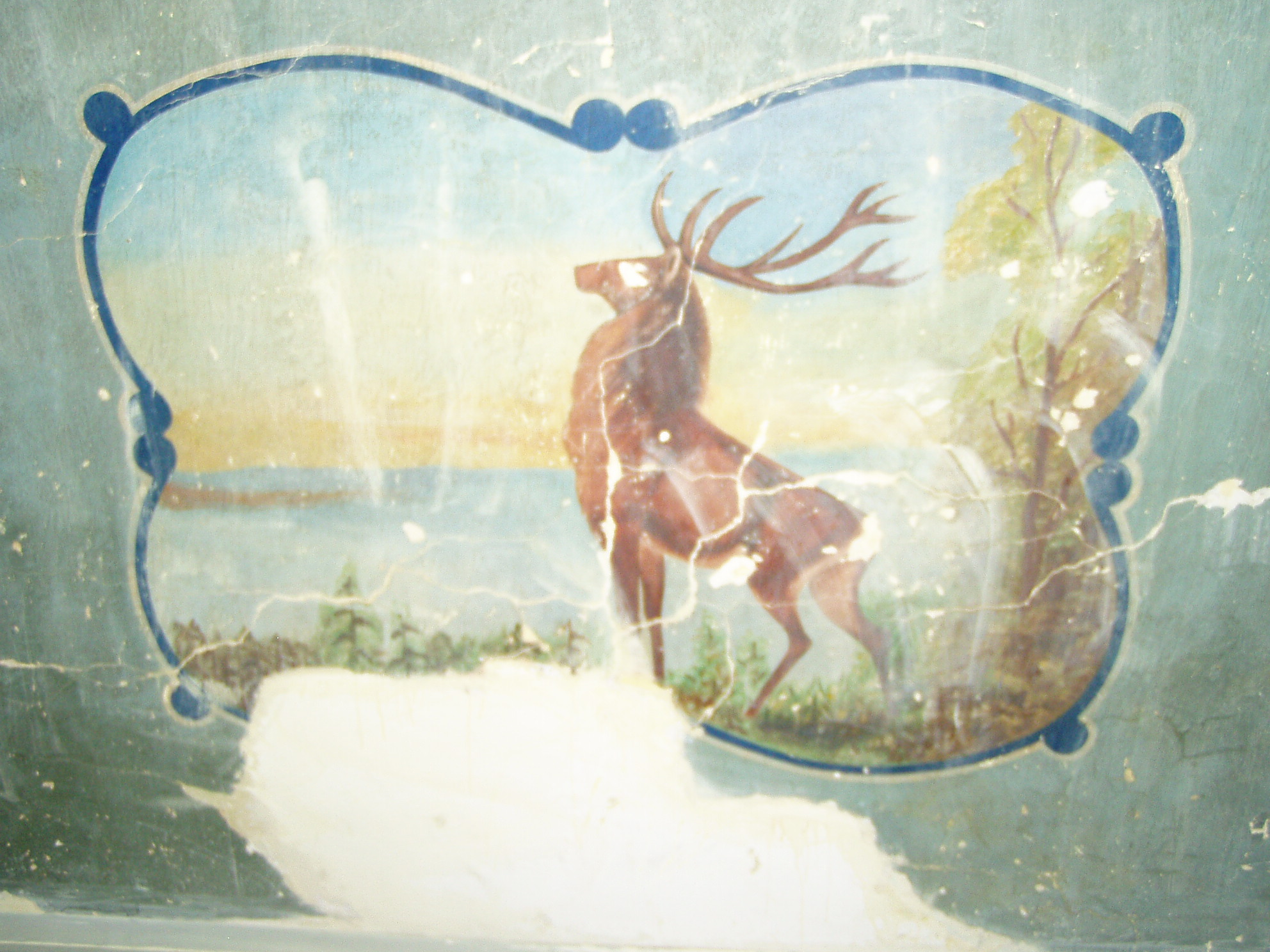 Wnetrze synagogi Chewra Thilim w Krakowie